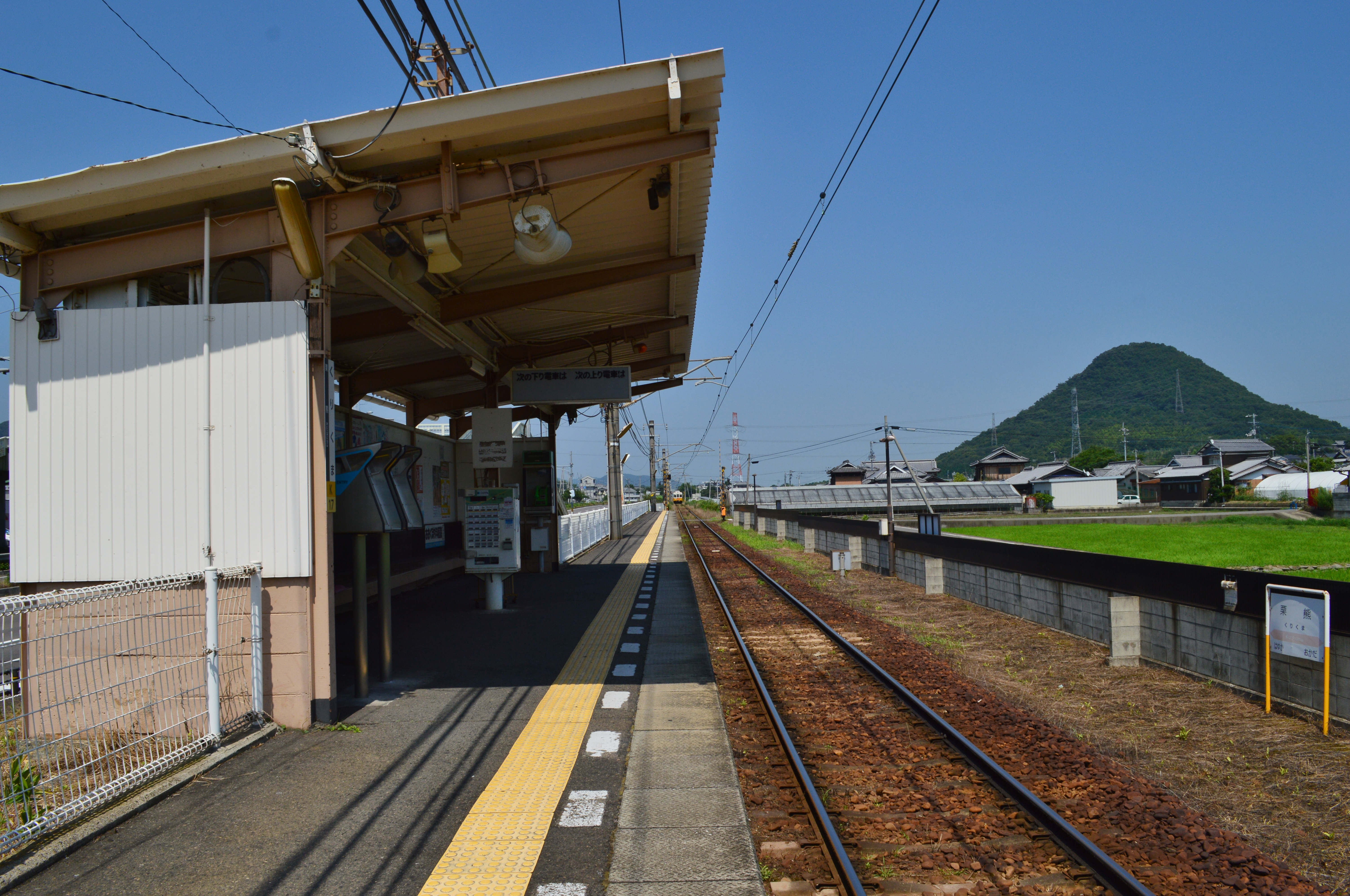 栗熊駅 プラットホーム